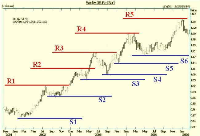 Description: Gráfica ilustrativa de soportes y resistencias eur diaria Source: Trabajo propio Author: LCB Date: Julio 21, 2006 Authorization: Dominio Público